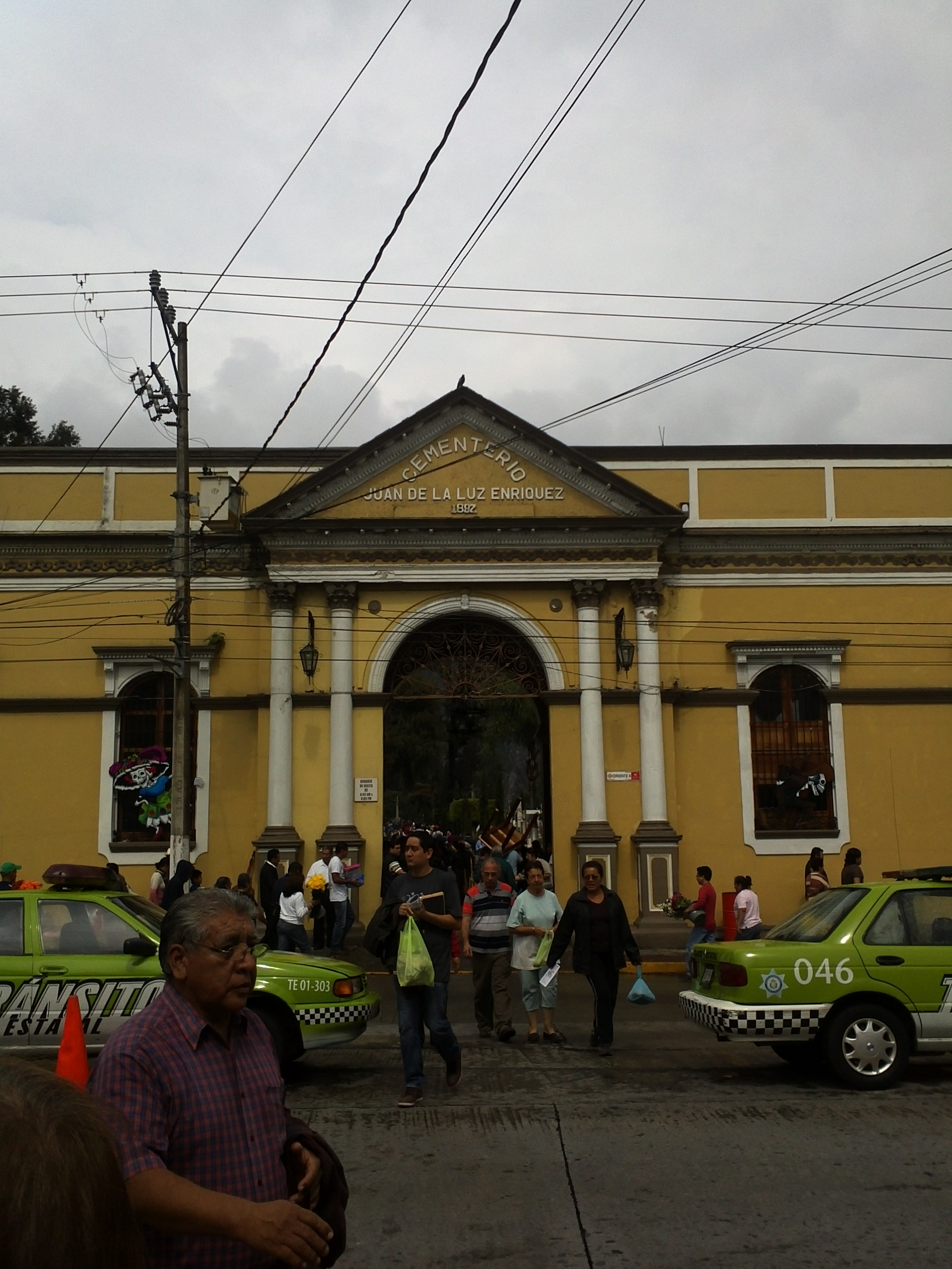 Entrada al panteón de Orizaba